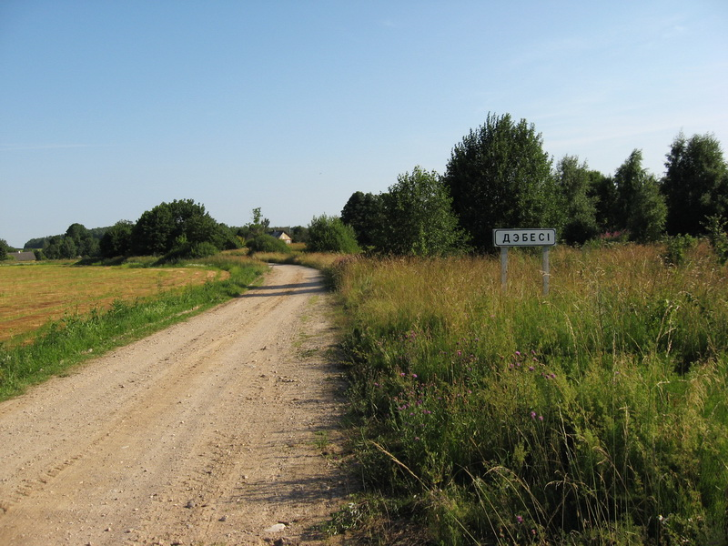 Дэбесі.